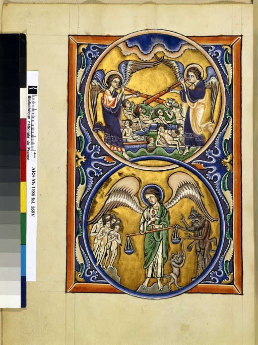 La résurrection des morts et la pesée des âmes.